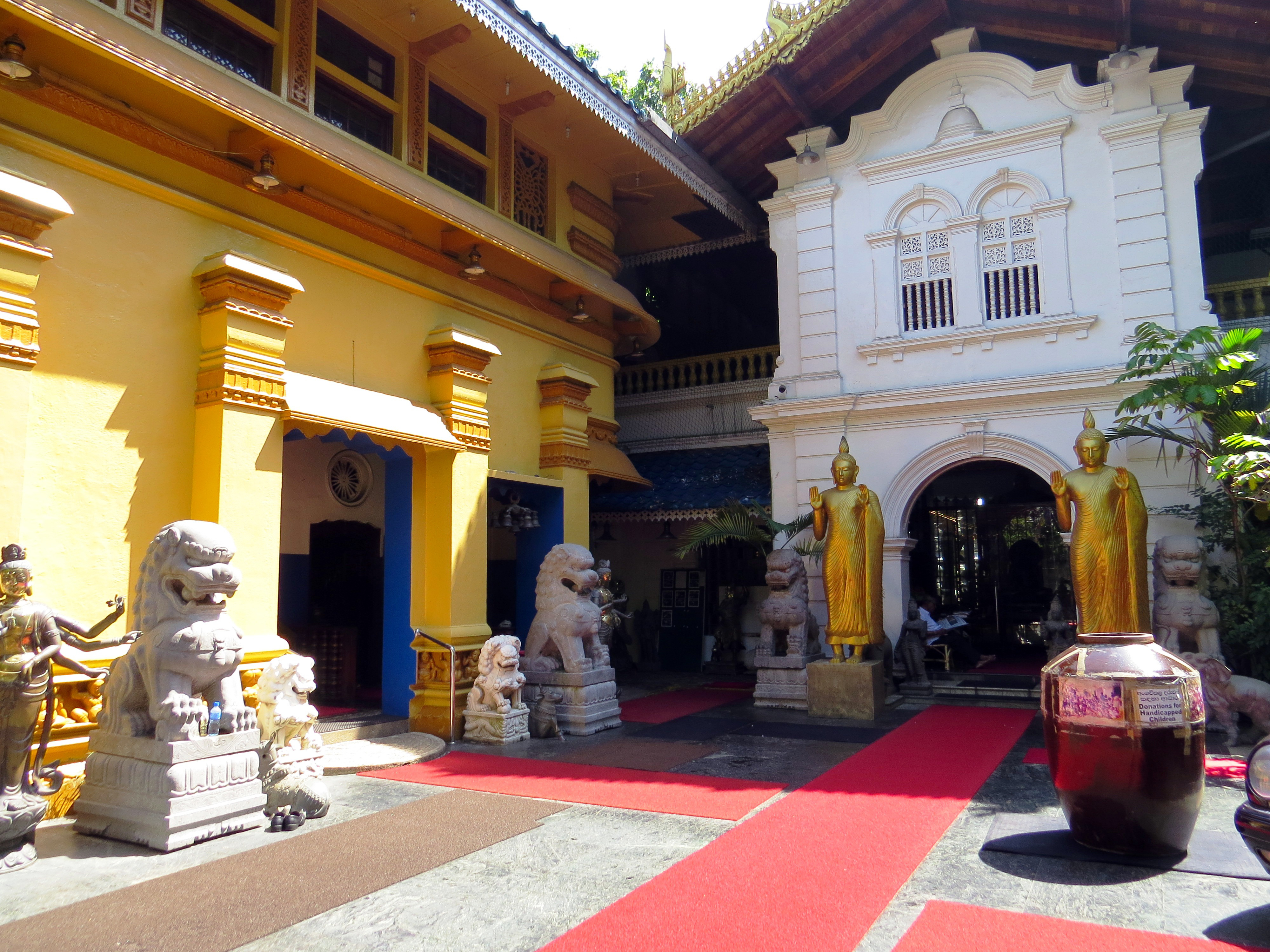 Храм Гангарама (Gangaramaya (Vihara) Buddhist Temple)